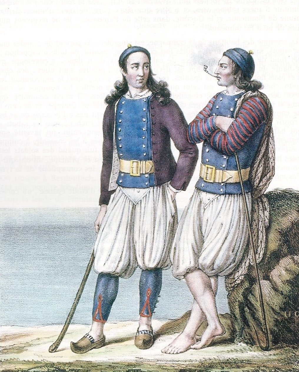 Paysans de Lesneven (dessin d'Henri-Désiré Charpentier, musée départemental breton, Quimper)